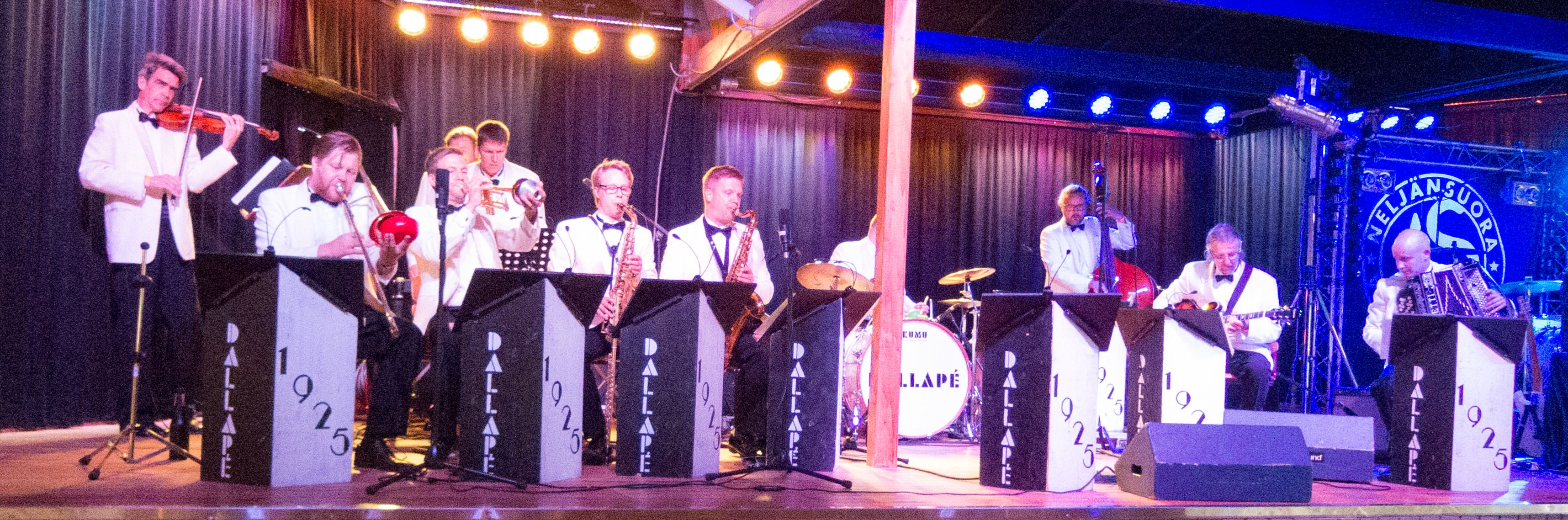 Dallapé 2014. Tässä kuvassa Mikko Hassinen, rummut; Jarmo Nikku, kitara; Timo Tolonen, basso; Niko Kumpuvaara, harmonikka; Antti Ohenoja, ksylofoni ja vibrafoni; Mauri Saarikoski, viulu; Roope Löflund, tenorisaksofoni; Teemu Takanen, alttosaksofoni; Janne Toivonen, trumpetti; Juha Kortehisto, pasuuna.